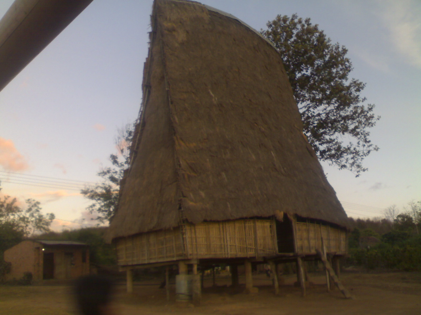 Nhà Rông truyền thống làng Kon Mông